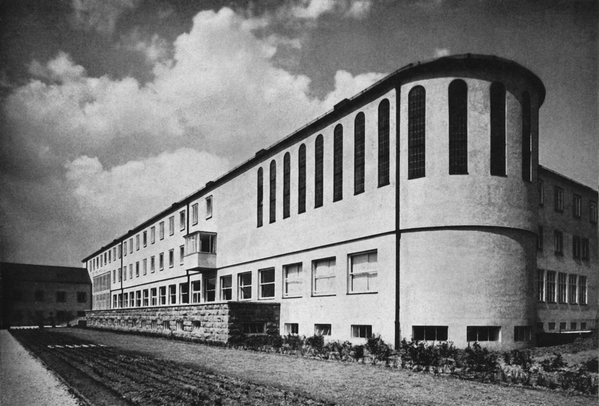 Priesterseminar in Limburg, Architekt; Dominikus Böhm